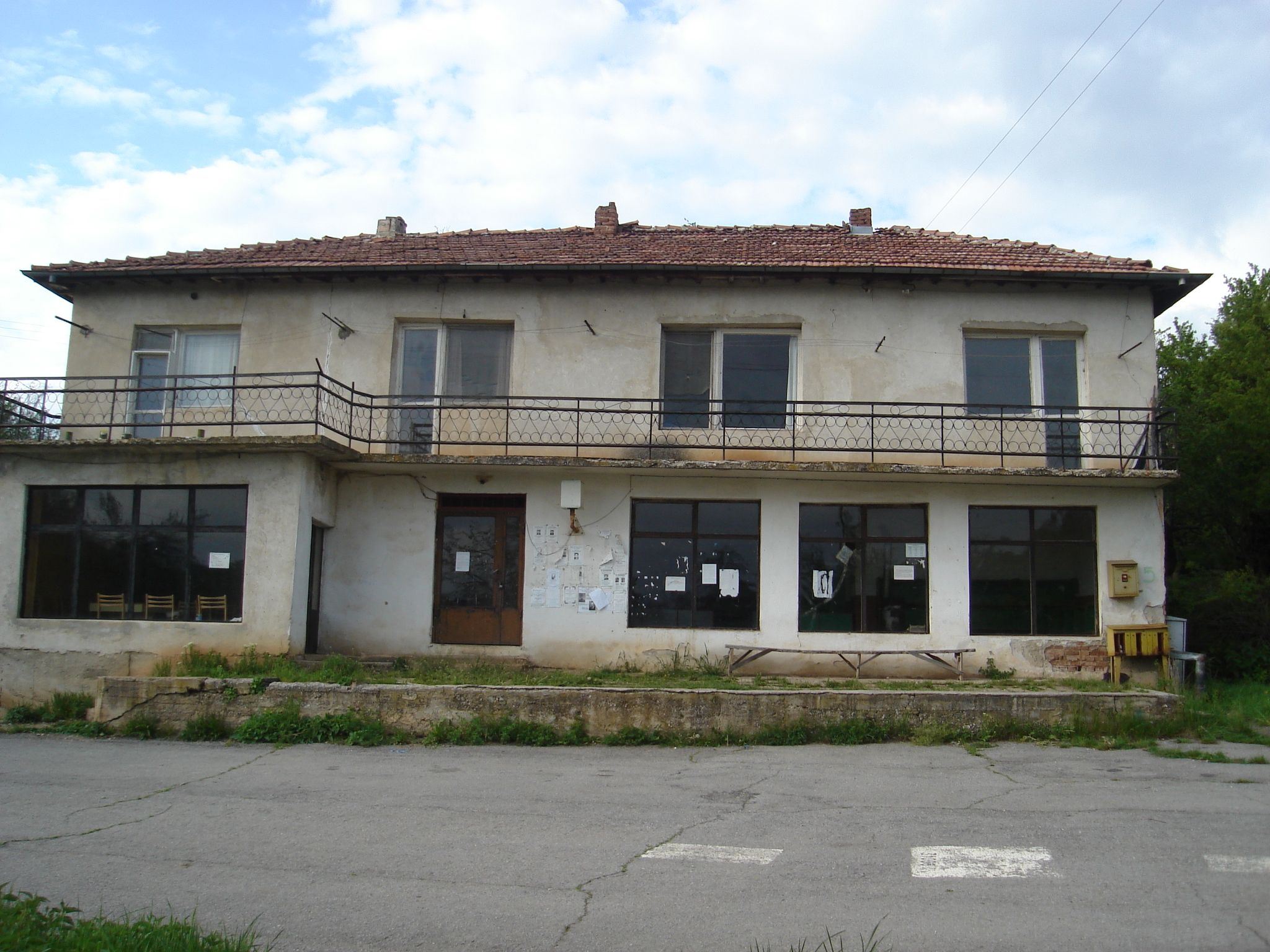 Обществена сграда в село Липинци, община Драгоман - бивш магазин, клуб, жилище за семействата на погранчните офицери.